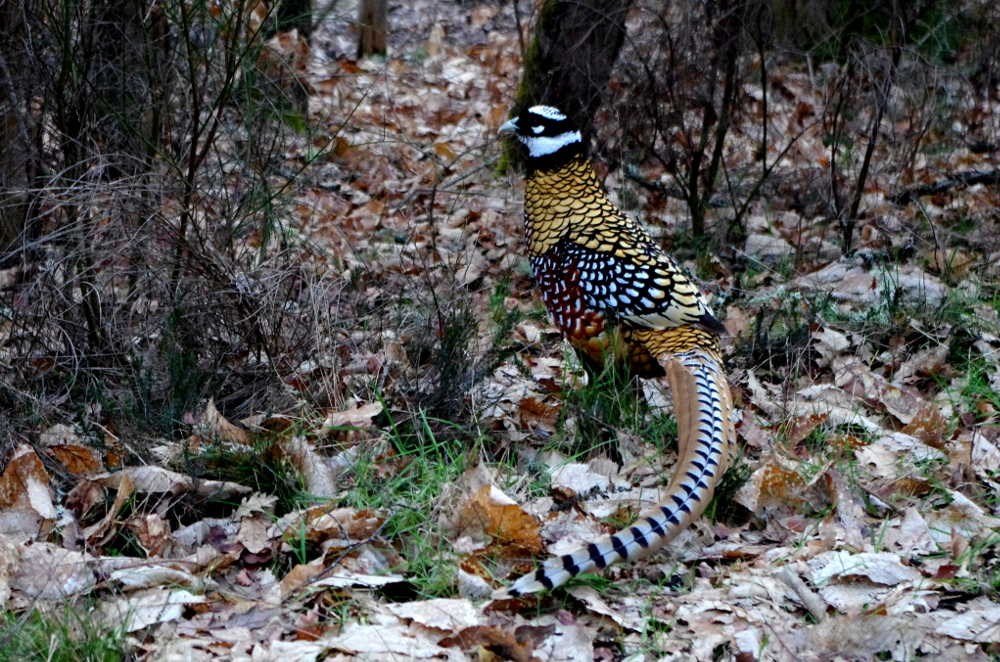 Faisan vénéré observé en Sologne (France) proche de la commune de lamotte-beuvron en mars 2015